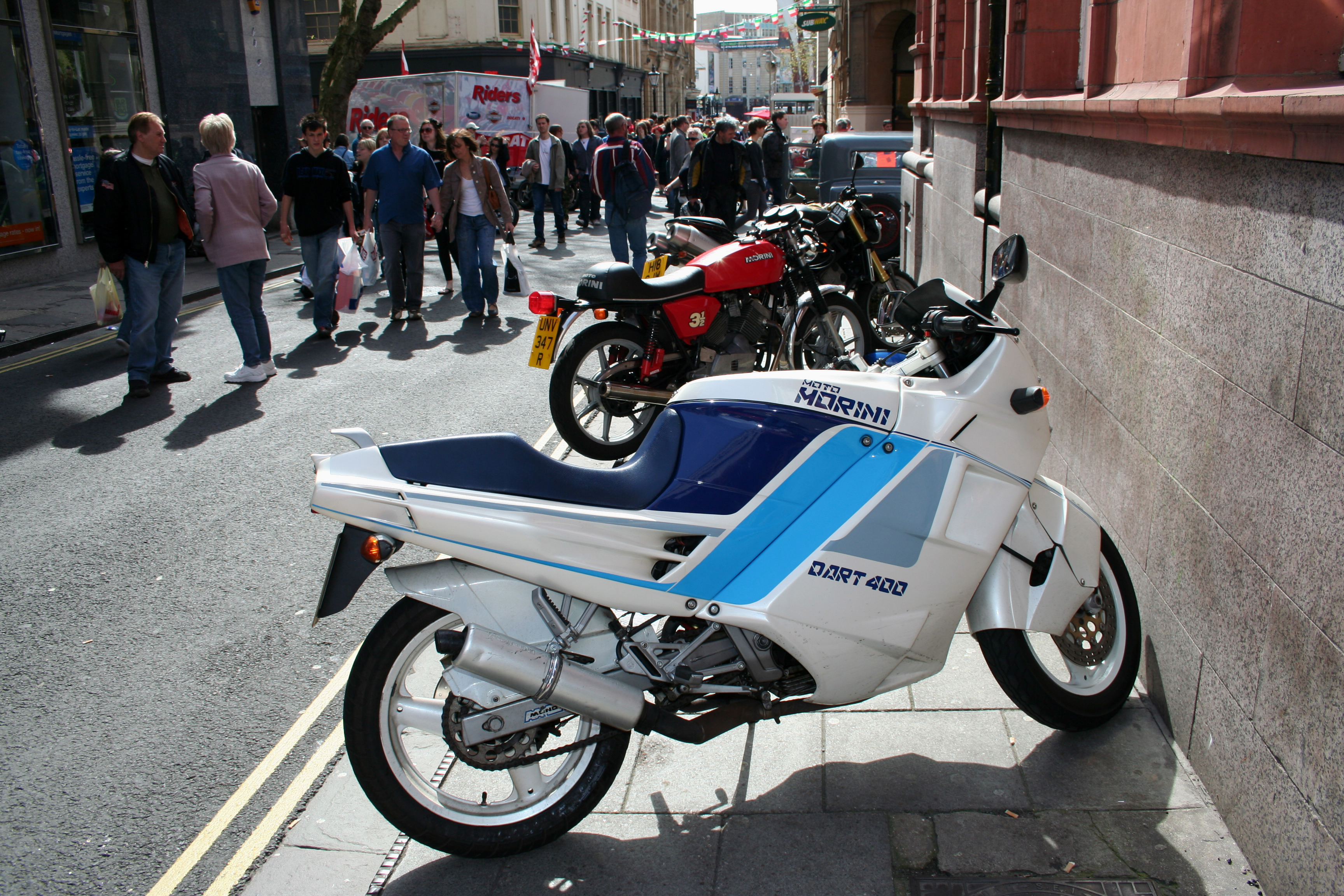 Bristol Italian Auto Moto Festival 2008